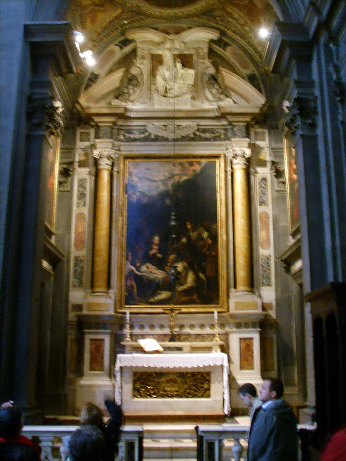 San Gaetano, Cappella Bonsi della Ntività